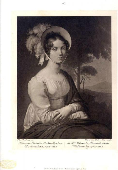 Портрет княгини З.А.Волконской